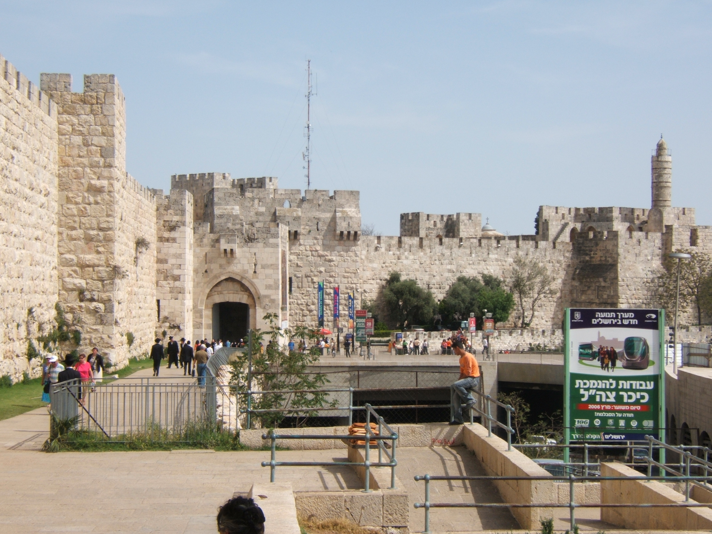 La puerta de Jafa, las murallas de la ciudad vieja y la ciudadela de David; Jerusalén, Israel.